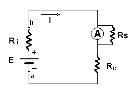 Conexión de un amperímetro en un circuito Schematic of the positioning of an ammeter in a circuit. NOTE: This image, created by me, was before uploaded to Wikipedia in Spanish, but I believe that now it is better in Commons.